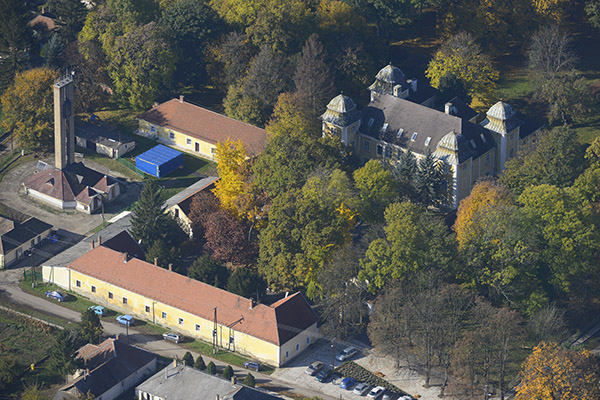 Girincs, Dőry-kastély légi felvételen